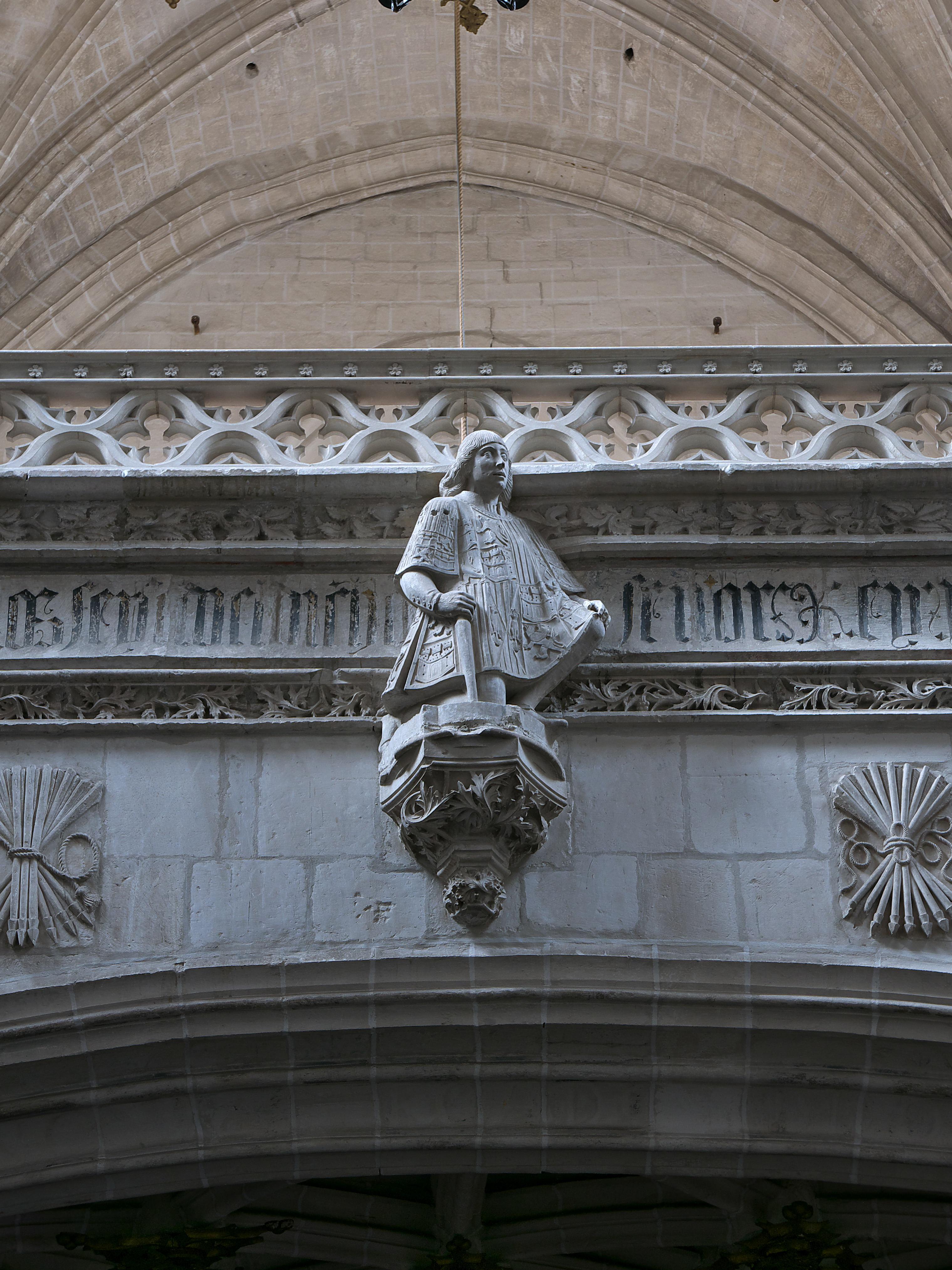 Monasterio de San Juan de los Reyes. La figura de Juan Guas en la clave del arco del coro de los pies de la iglesia. Empuñando un pendón, viste como heraldo.